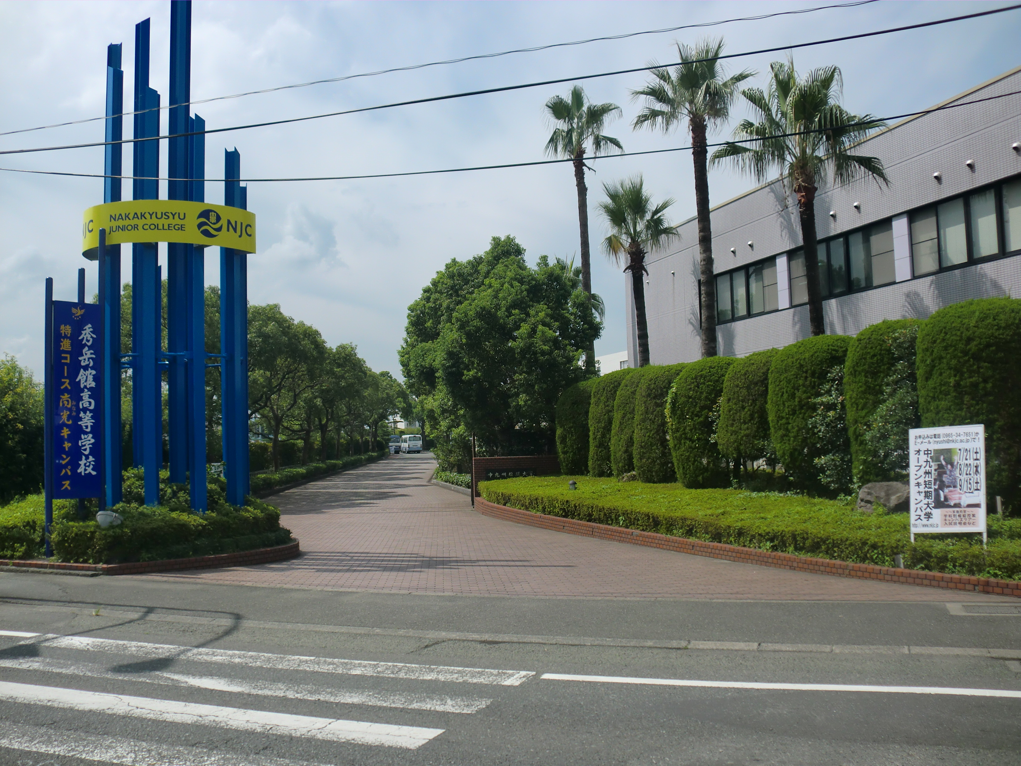 熊本県八代市にある中九州（なかきゅうしゅう）短期大学正門